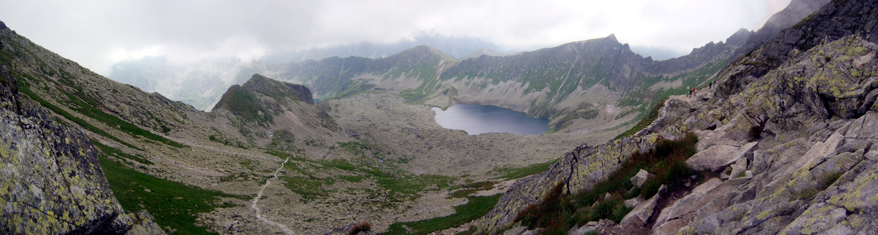 Panorama z Zawratu na Dolinę Pięciu Stawów Polskich (widoczny niebieski szlak turystyczny)